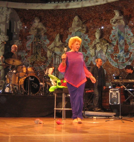 Ornella Vanoni en escena - 2